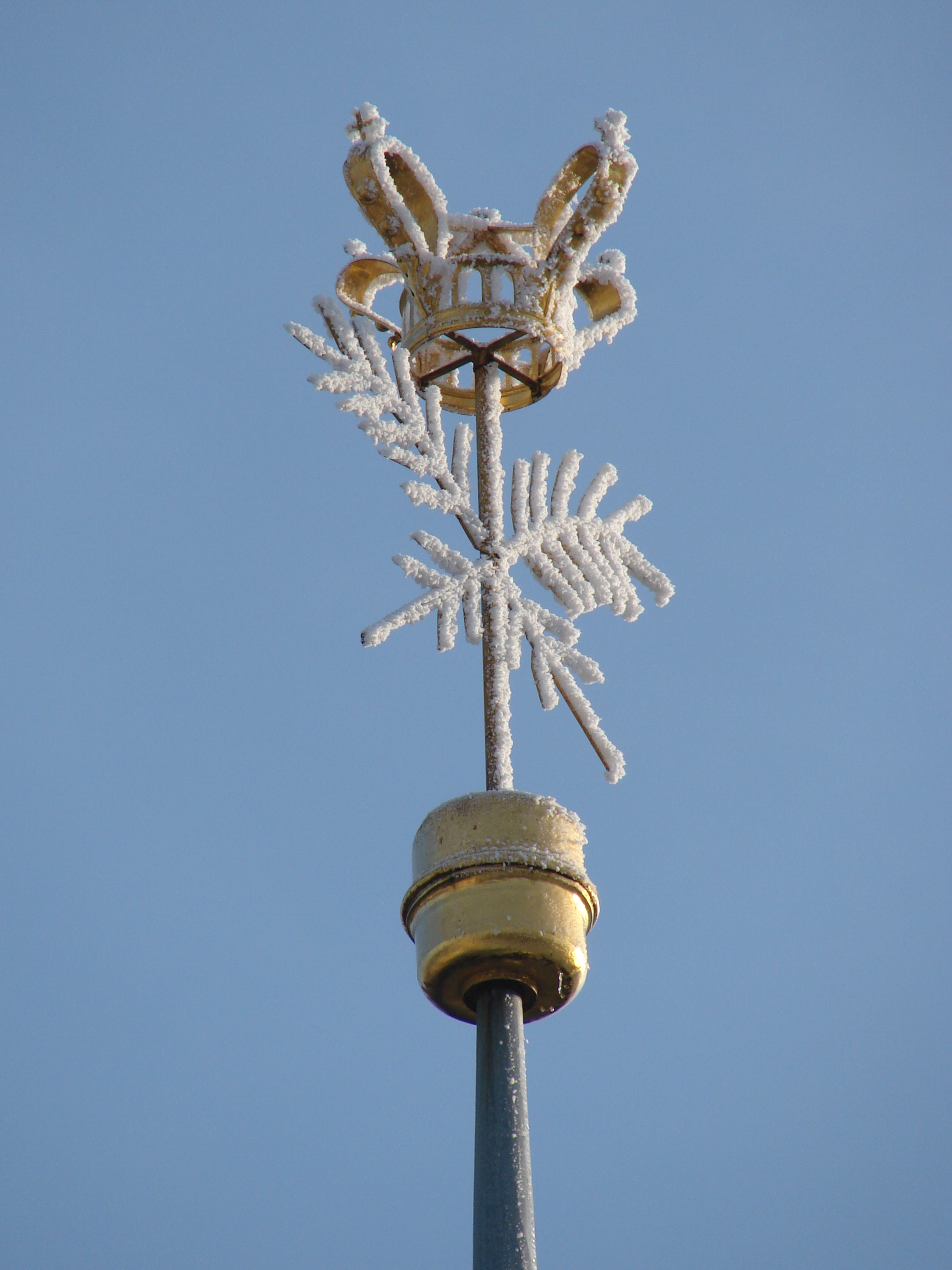 корона